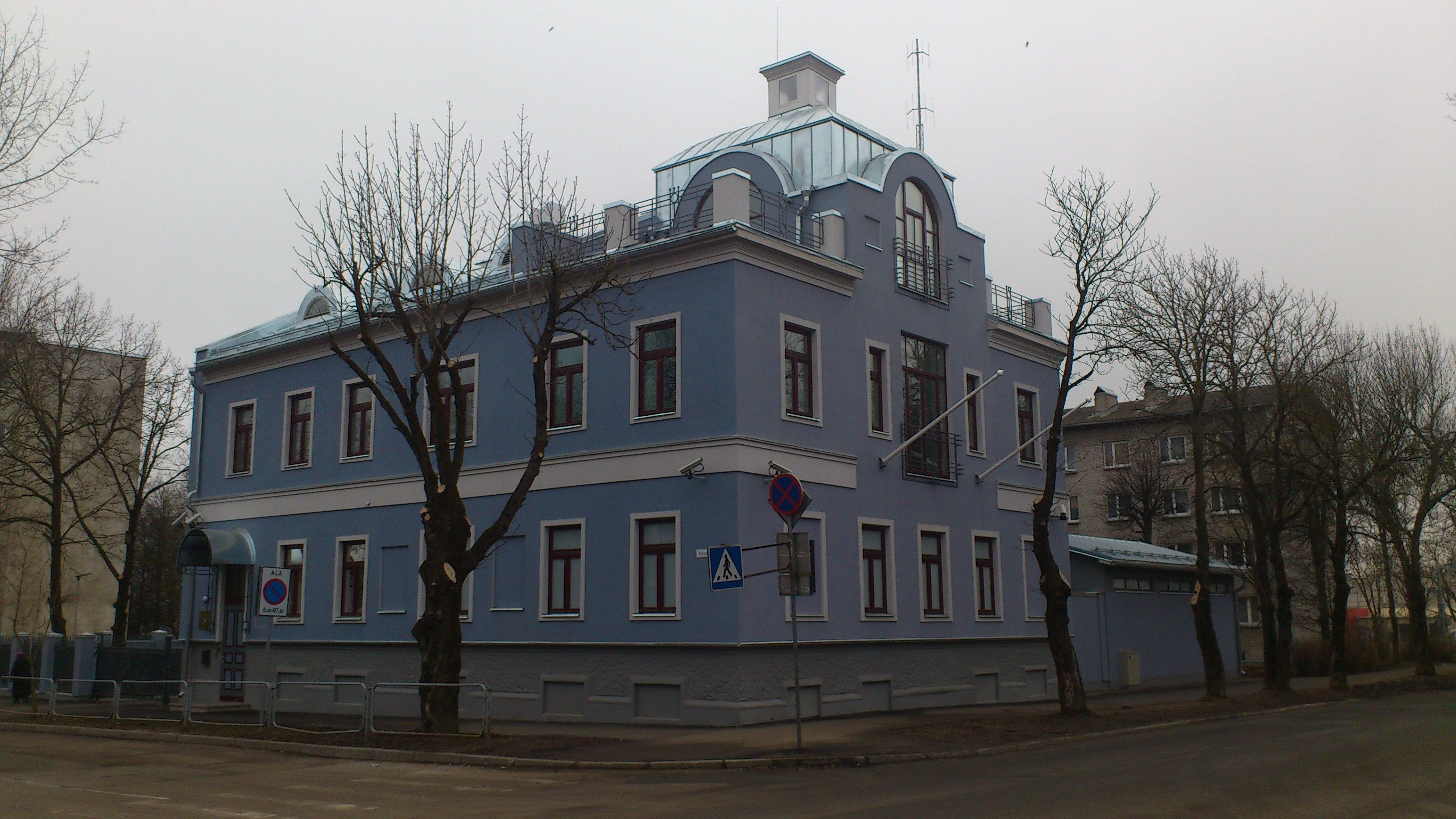 Hoone aadressil Vabaduse 15, Narva. Vaade Vabaduse tänavast